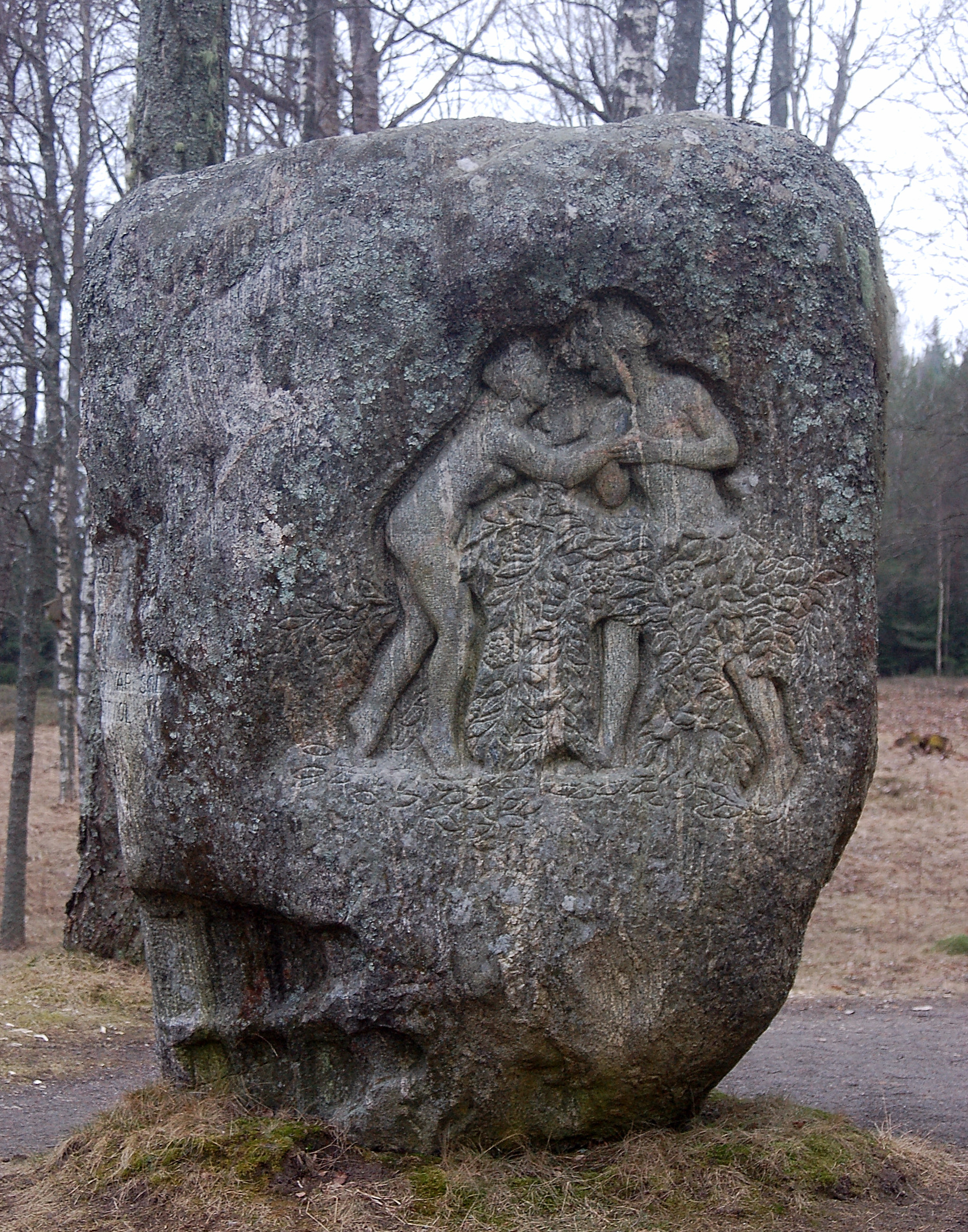 Christian Erikssons minnesten över skalden Gustaf Frödig placerad i Alster.